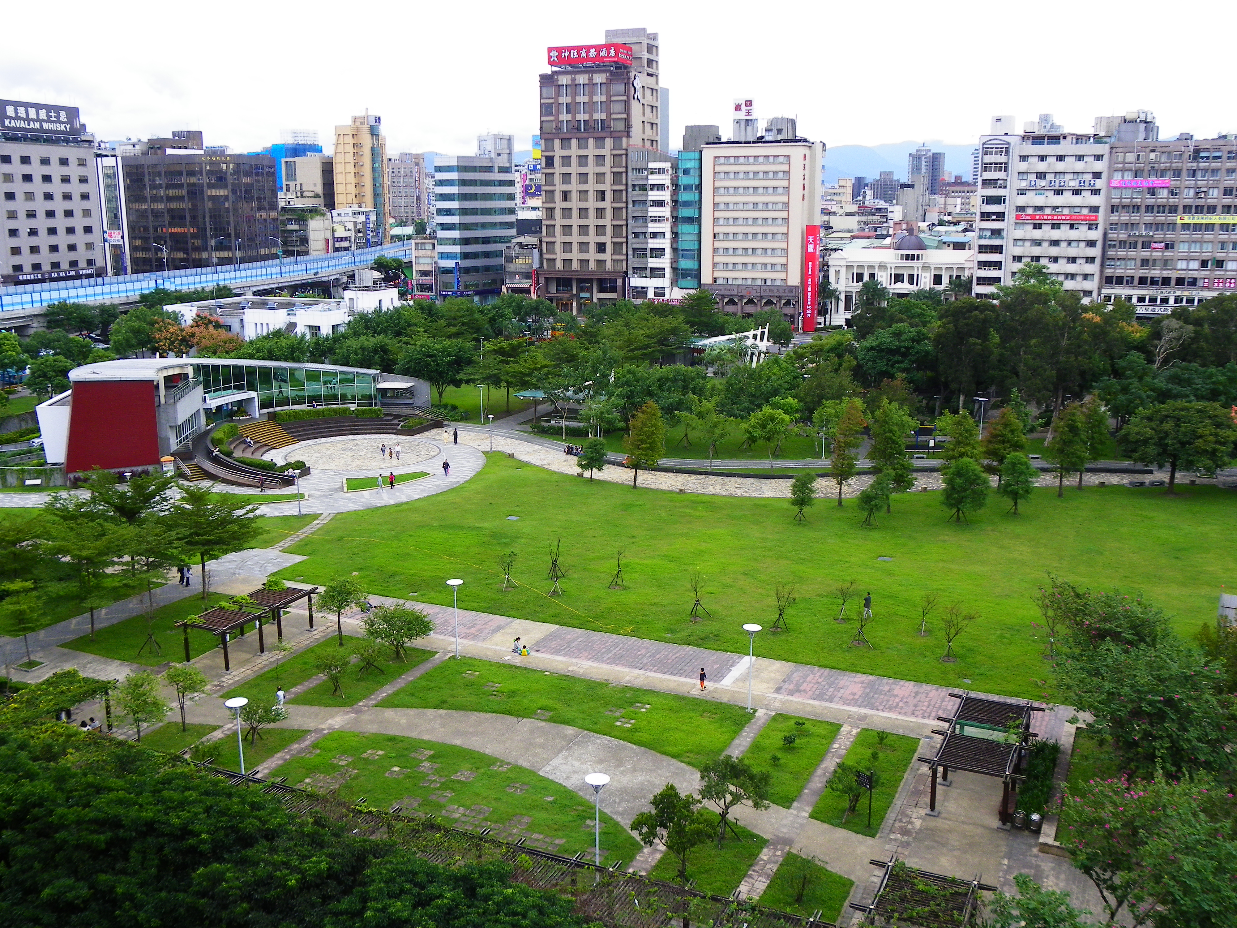 林森公園東半部與康樂區民活動中心南向鳥瞰，攝於欣欣百貨公司。最高樓為神旺商務酒店。